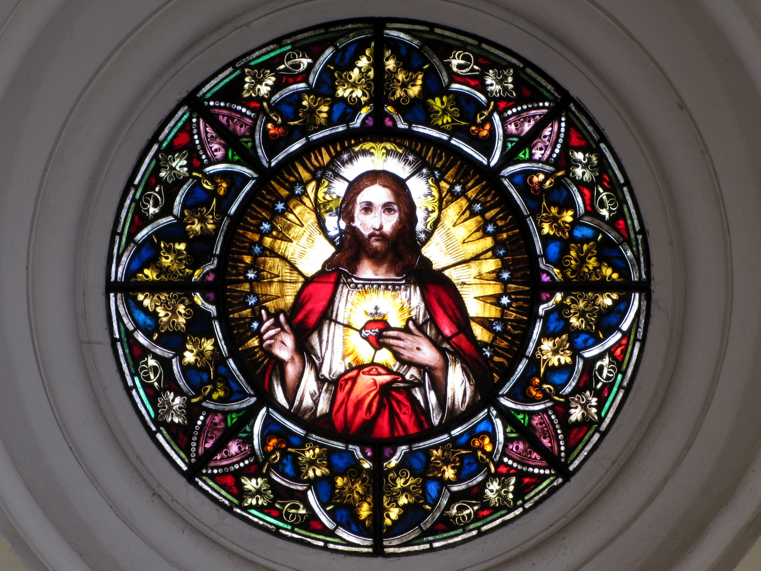 Vitráž "Nejsvětější Srdce Ježíšovo" nad hlavním oltářem v kostele sv. Václava v Kostelci u Kyjova, okres Hodonín